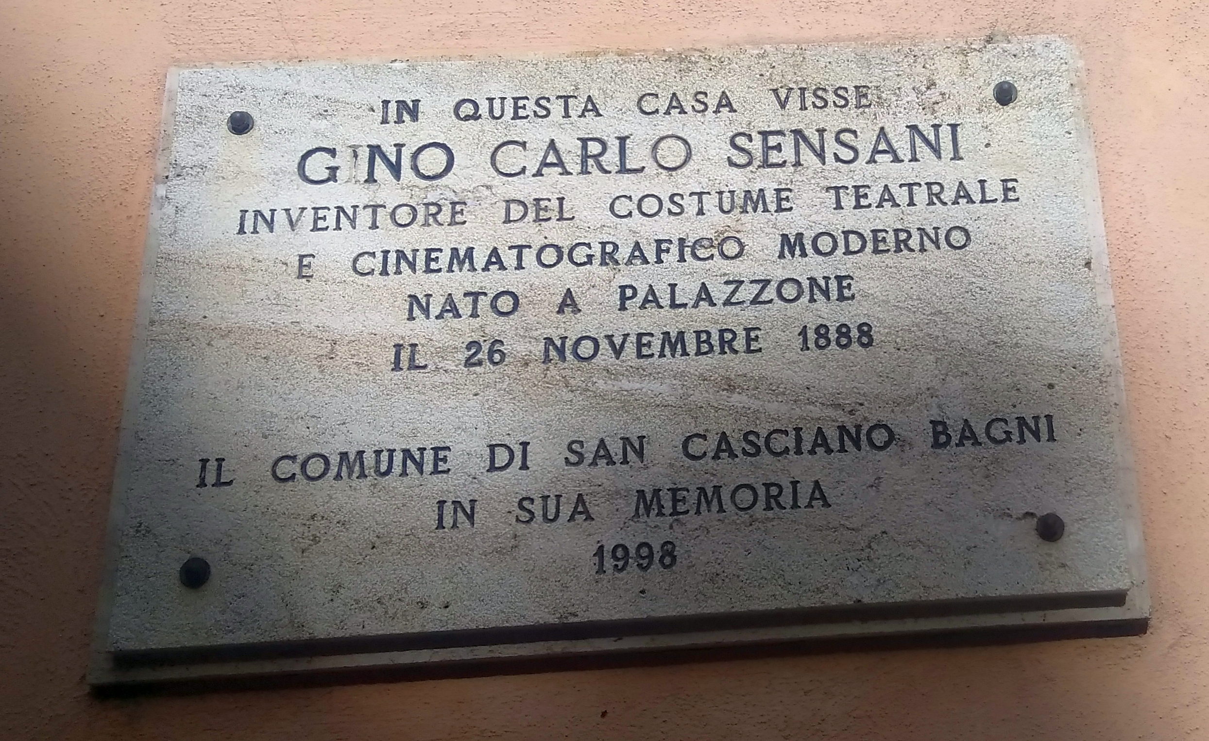 Gino Carlo Sensani: la lapide commemorativa a San Casciano dei Bagni